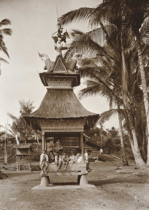 Foto. Groepje jongens in een geriten, een traditioneel schedelhuisje, te Sarinembah, Karolanden, Sumatra`s Oostkust